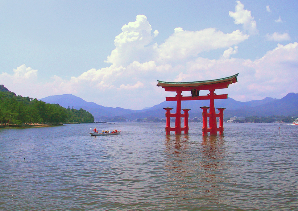 A Japanese torii at dusk at Itsukushima Shrine